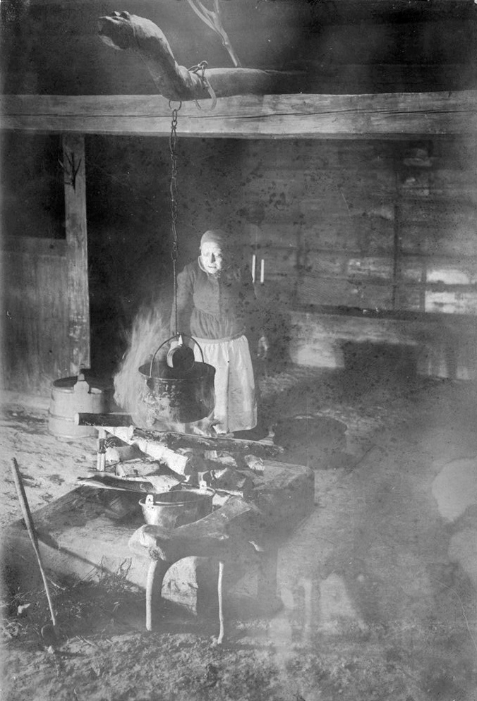 "Prästänkan". Mathilde Nielsen.